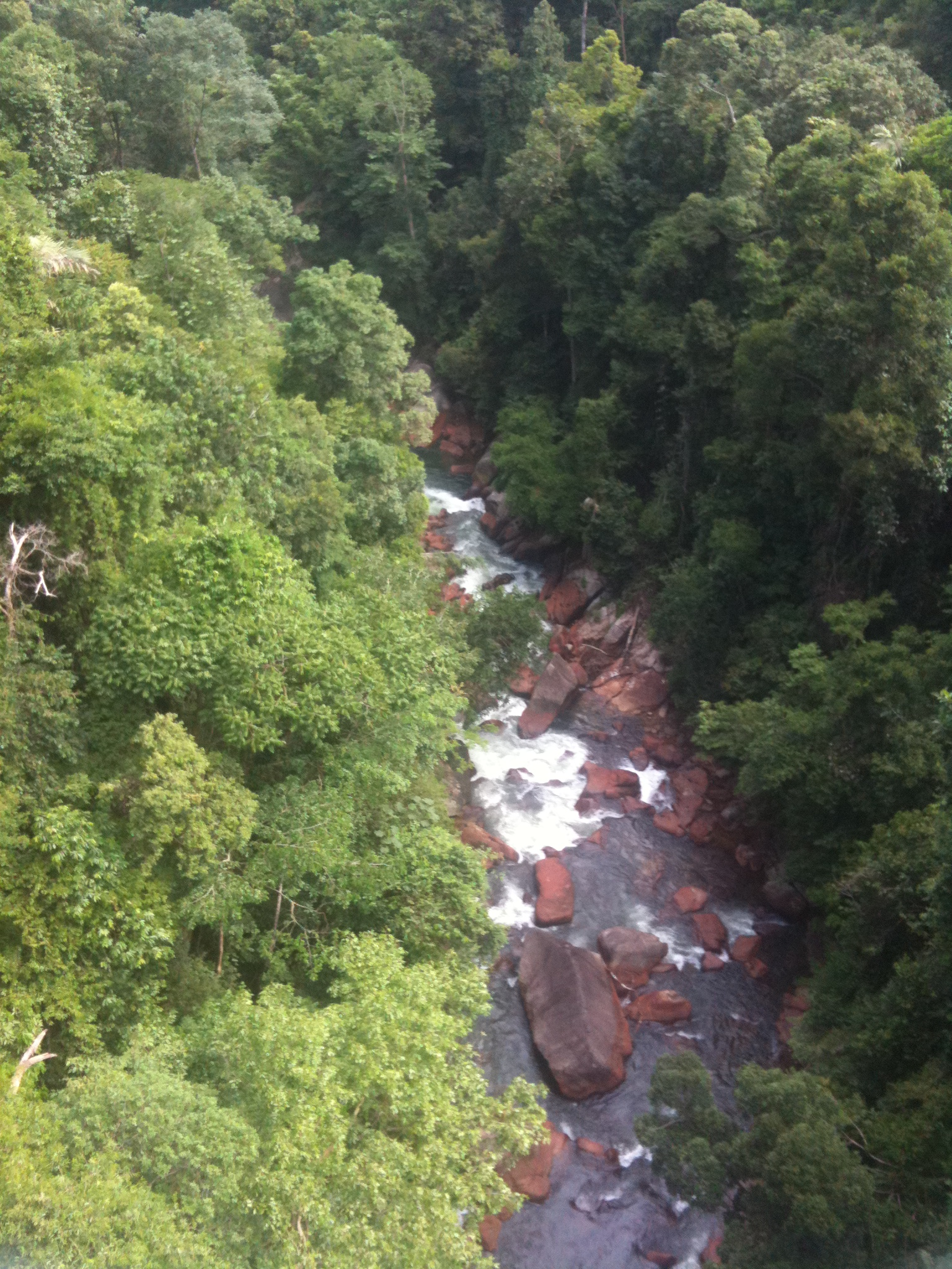 Sungai Hulu Selangor